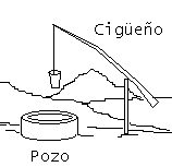 Dibujo esquemático de un cigüeño o cigoñal (fuente: elaboración propia)